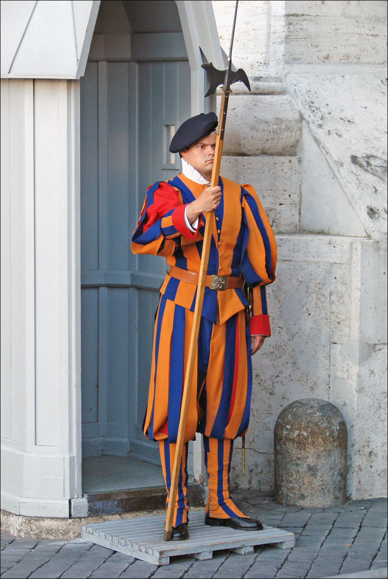 Garde suisse à l'entrée du palais apostolique Les premiers gardes suisses sont arrivés à Rome en 1505. Ils constituent, depuis cette date, l'armée du Pape. Ils sont tenus d'assister tous les jours à la messe et de dormir au Vatican dans leur caserne.